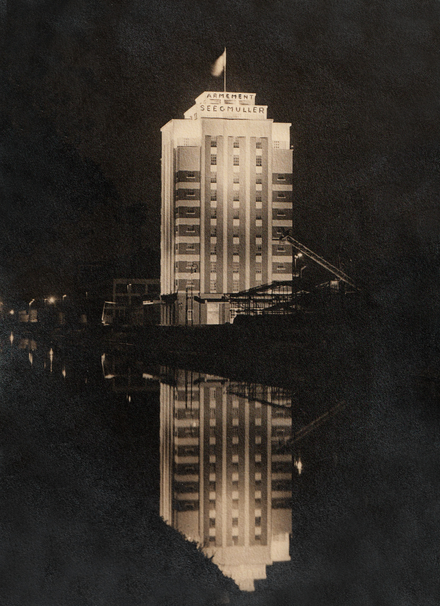 Ancien silo de l'Armement Seegmüller à Strasbourg, le 14 juillet 1935.